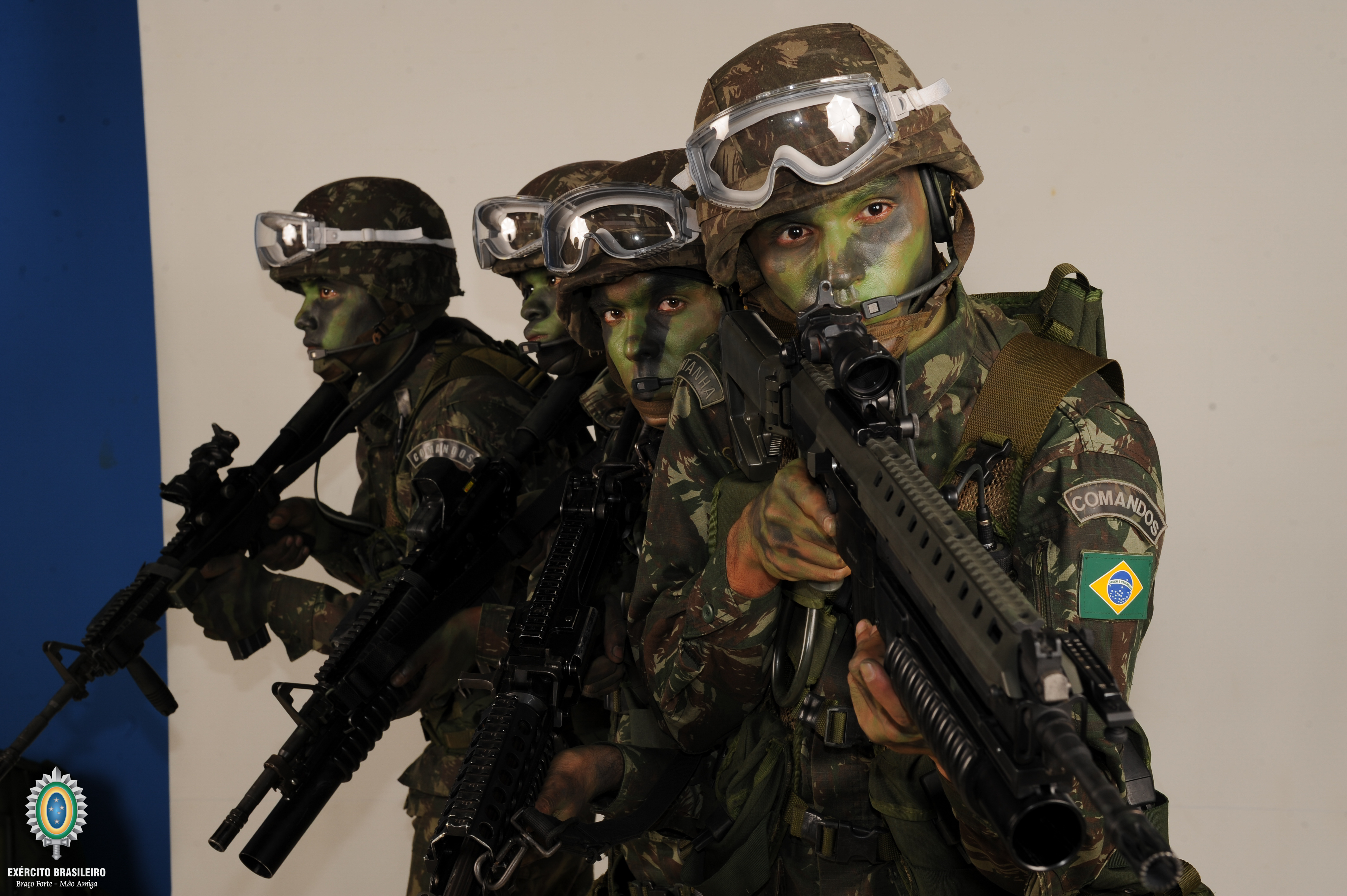 Comandos, Forças Especiais, combatente, Exército, Tiro instintivo caatinga, paraquedistas, atirador, sniper, mergulhadores